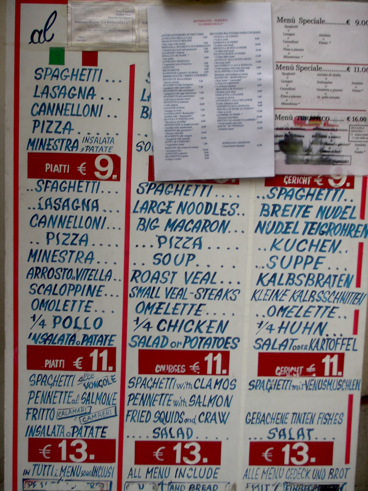 Multilinguale (mehrsprachige) Speisekarte, fotografiert in Rom.